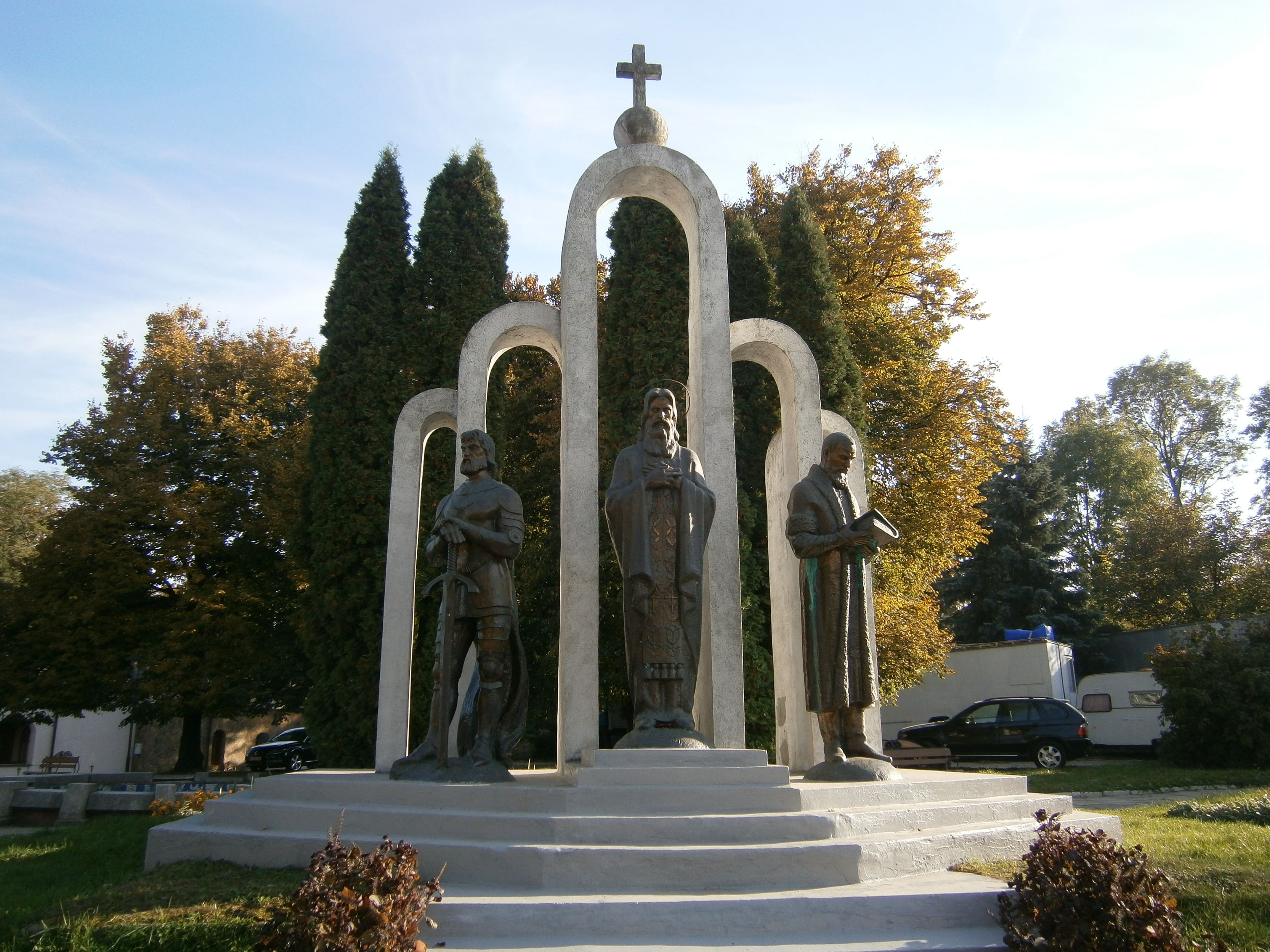 Пам’ятник князям Острозьким, Острог, проспект Незалежності